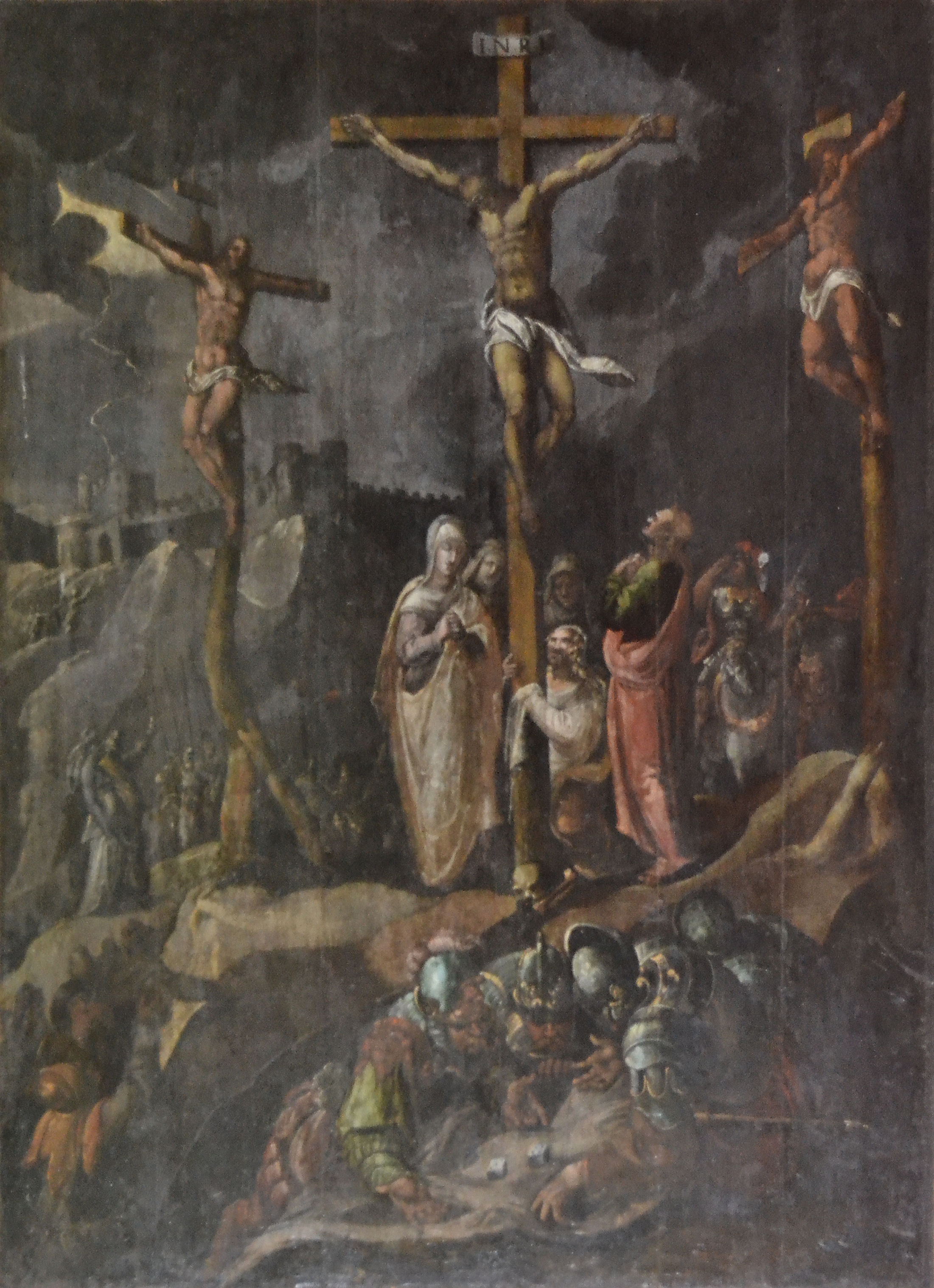 Marianowo - zespół klasztorny cystersów